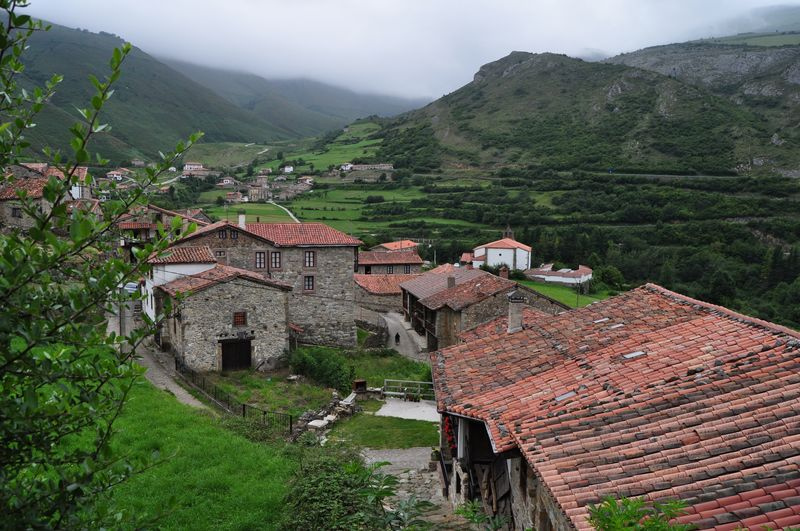 vista desde el balcón